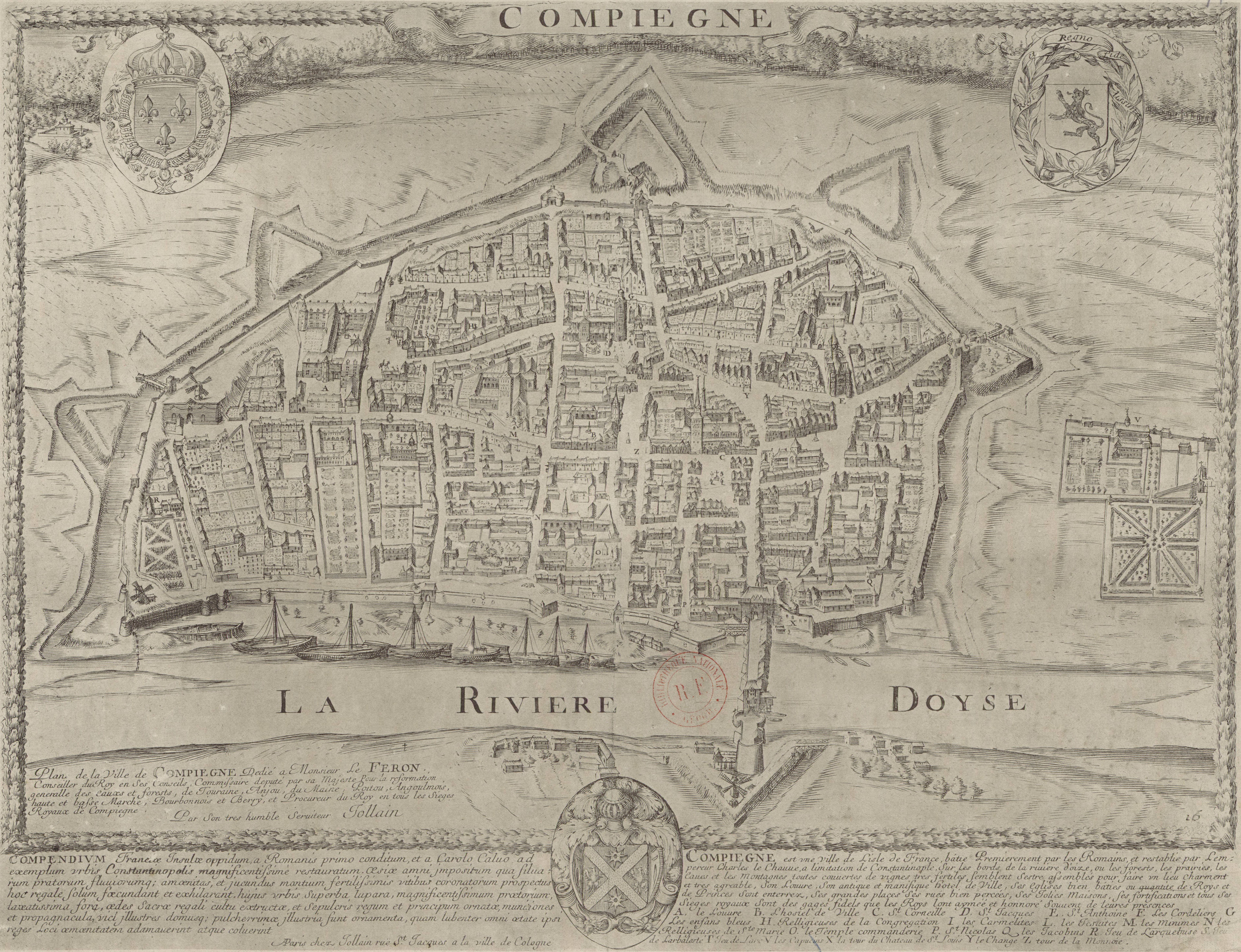 Stadtplan von Compiègne aus dem 17. Jahrhundert